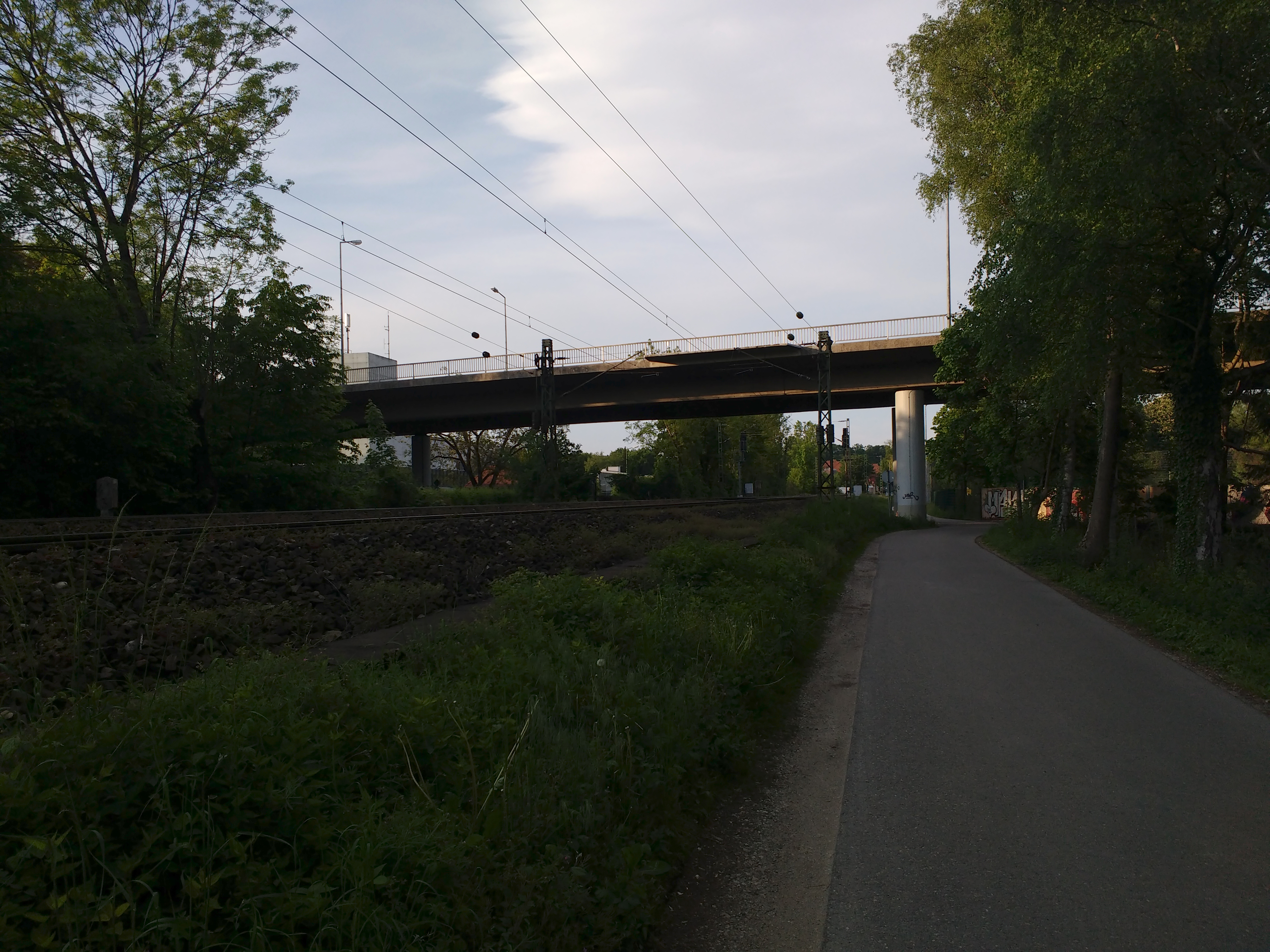 Hochtrasse Freising; Brücke die die ehemalige B11, zwei Moosacharme und die Bahnstrecke München–Regensburg überquert